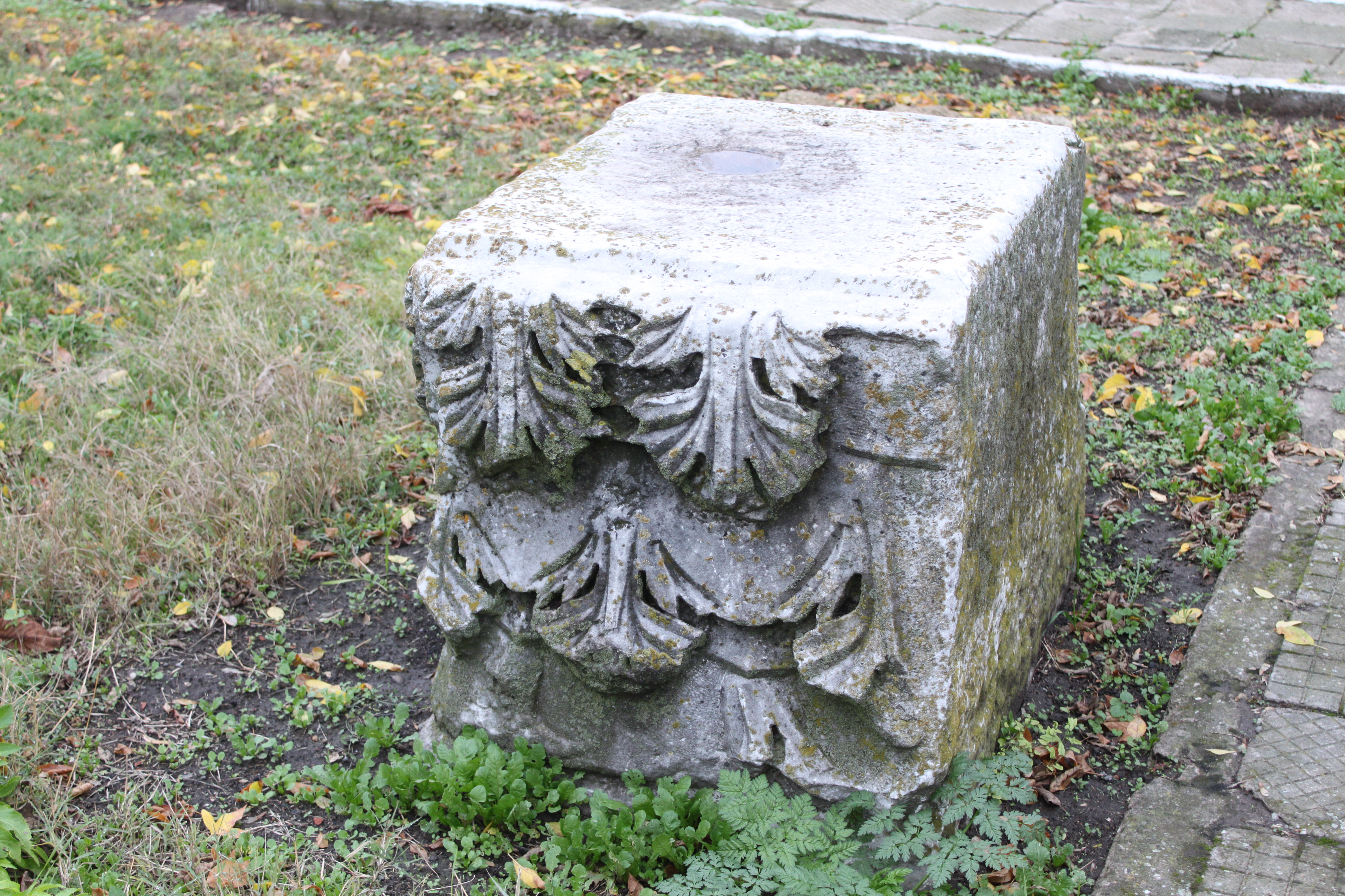 Colonia Ulpia Oescus: lateinisch Ulpia Escus; Nordbulgarien; an der Donau; beim Dorf Gigen; menschenleer; eingezäunt; gepflegte Anlage